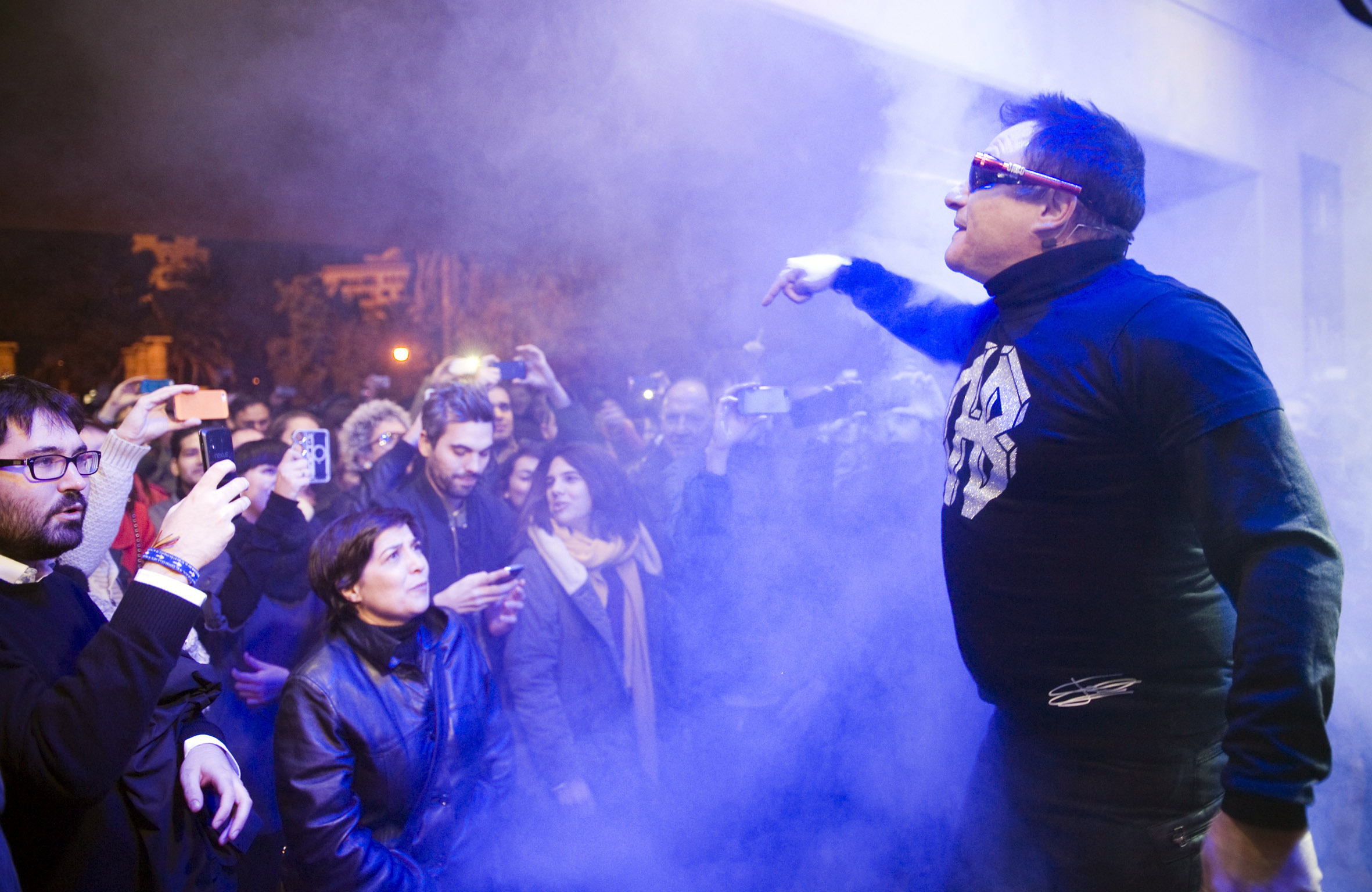 Inauguració de l'exposició "Ídols pop", amb l'actuació de Ximo Bayo. Fotografia: Raquel Abulaila.